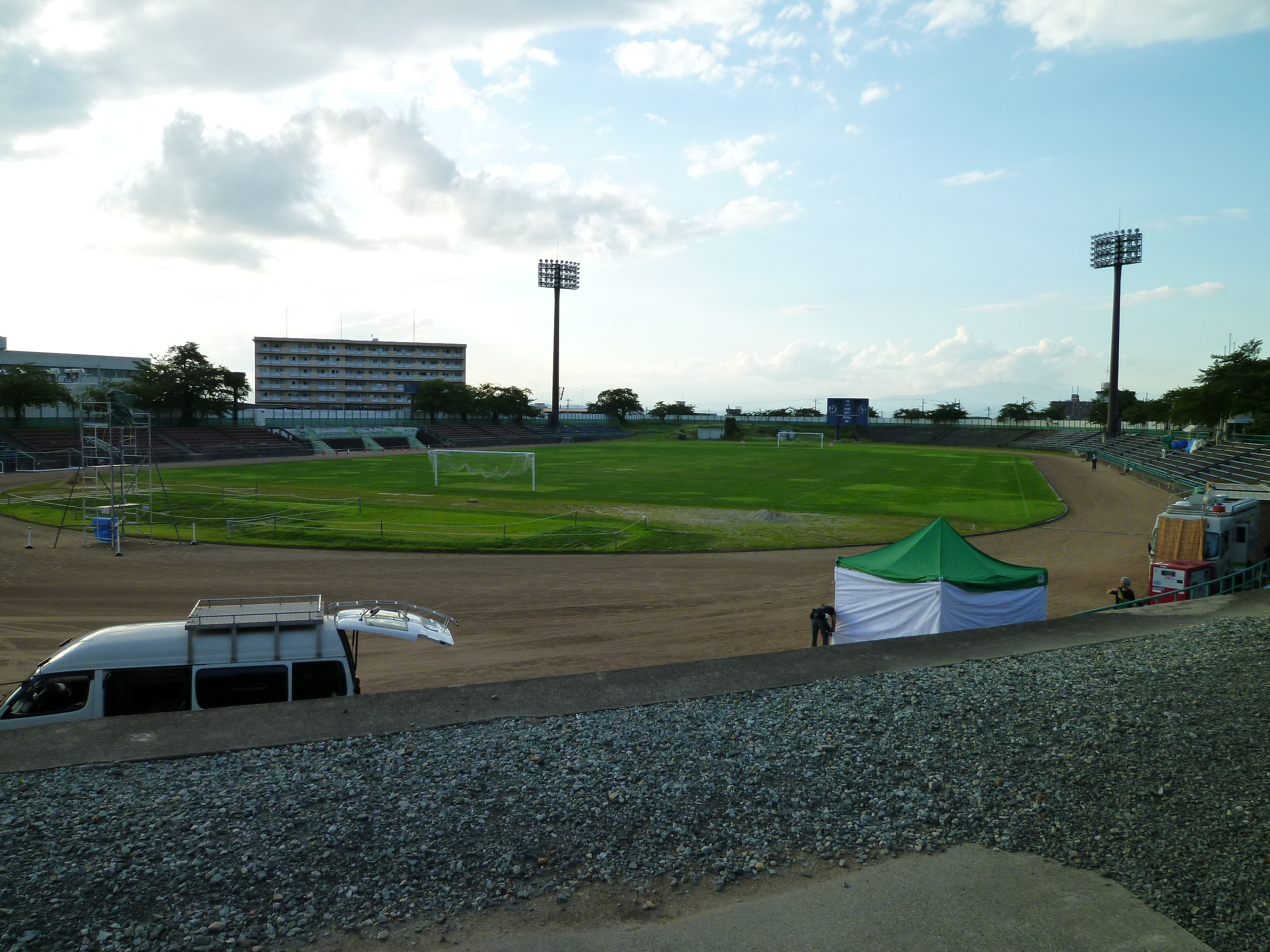 山形市陸上競技場（山形市薬師町）